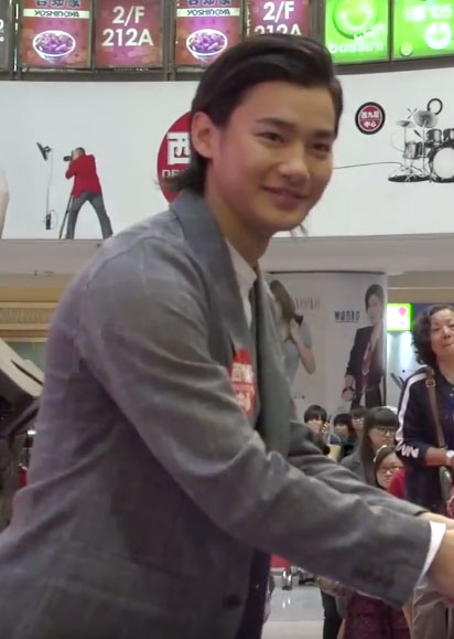 中文（香港）: 野村周平寫真集Nomura Shuhei in Kinema香港首次見面會@西九龍中心